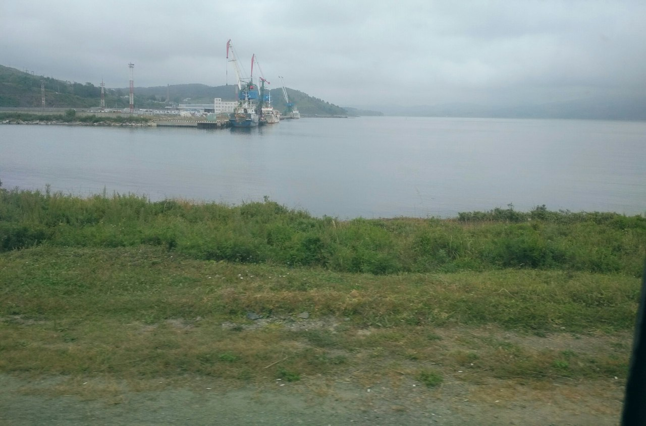 ООО "Морской порт в бухте Троицы"